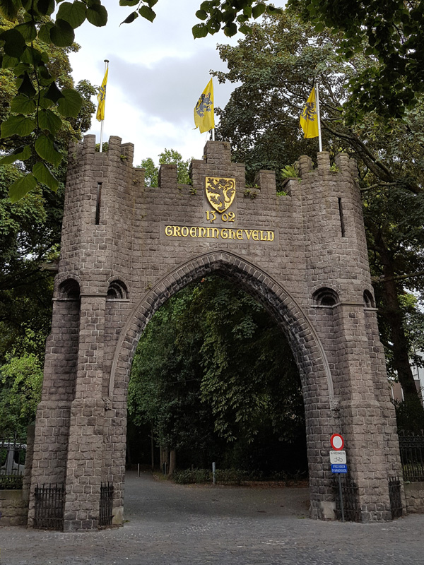 La porte de Groeninghe a été conçue par l'architecte brugeois Jos. Viérin et inaugurée le 11 juillet 1909.